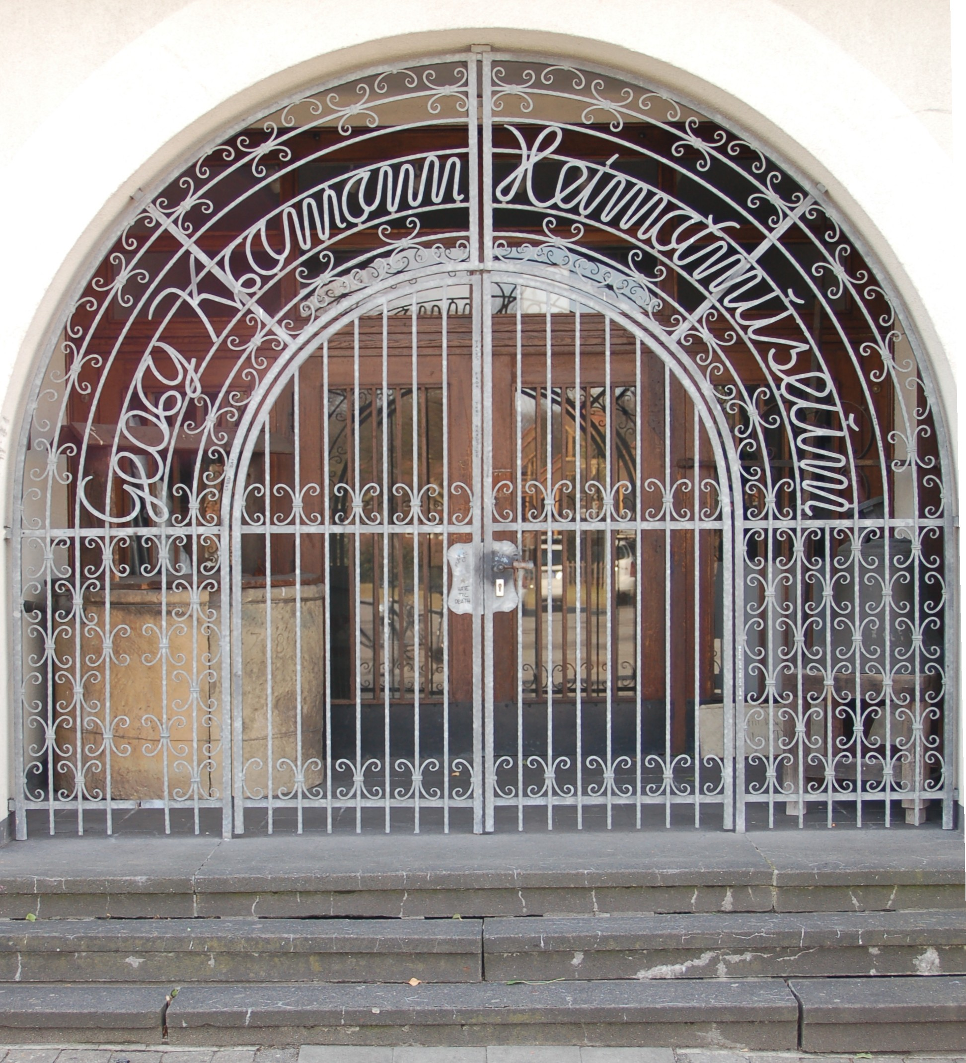 Der Eingang des Heimatmuseums in Nordwalde